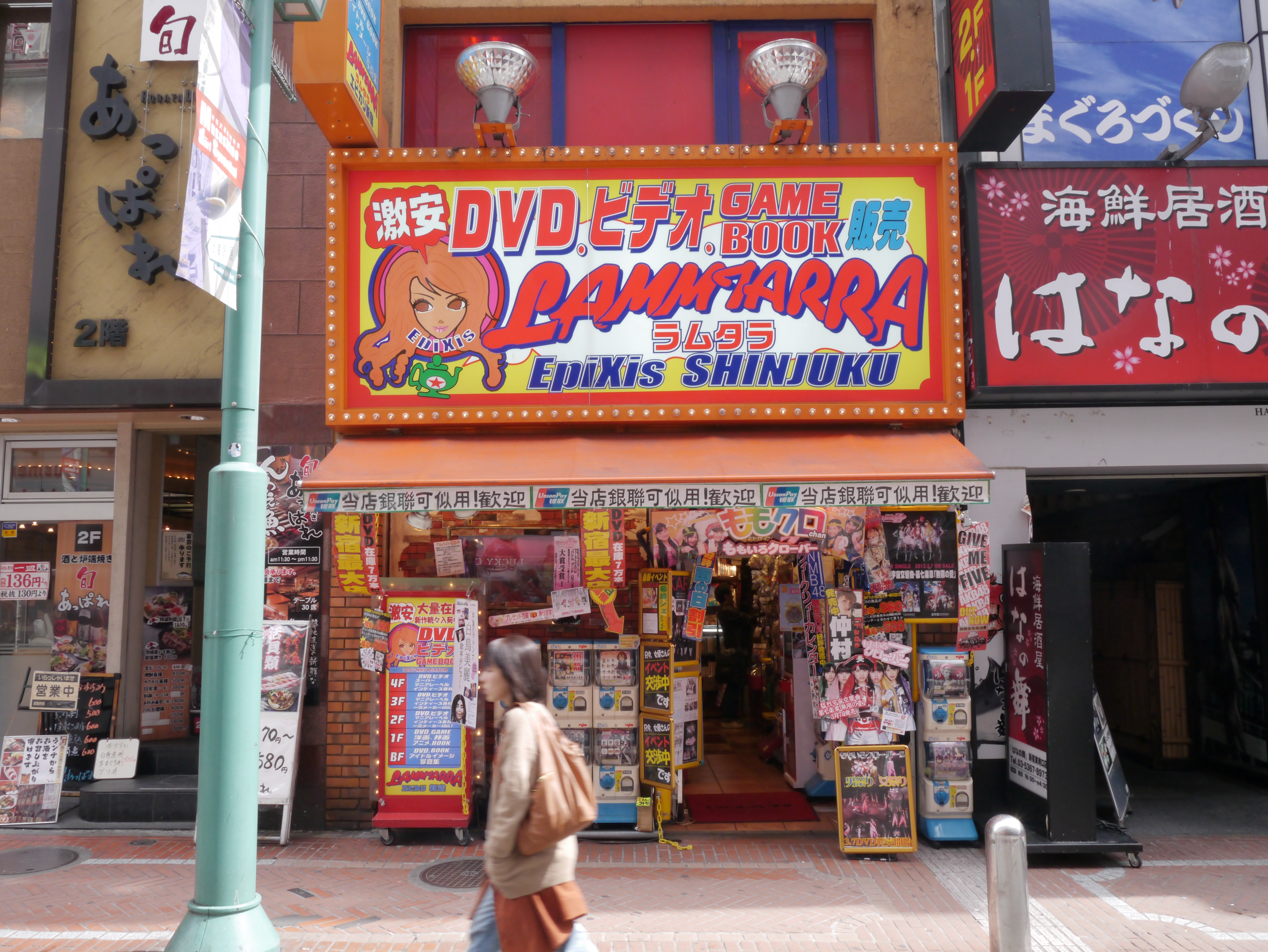 大好評 雨の日 割引